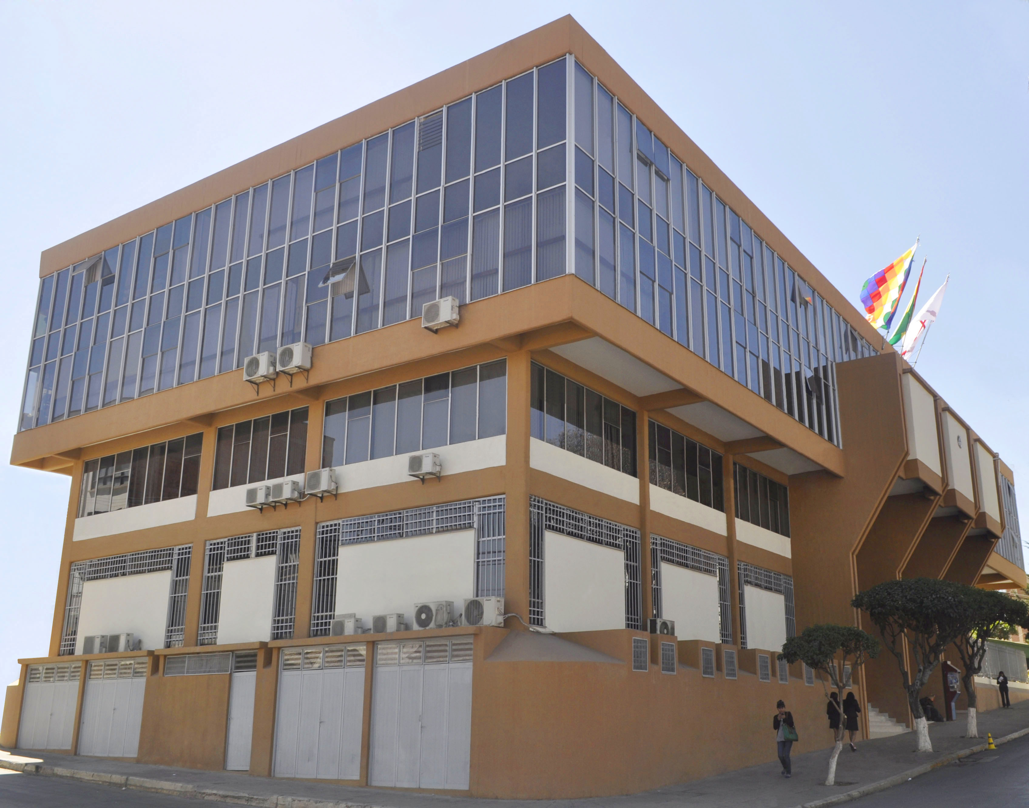 Edificio donde funciona el Tribunal Constitucional Plurinacional